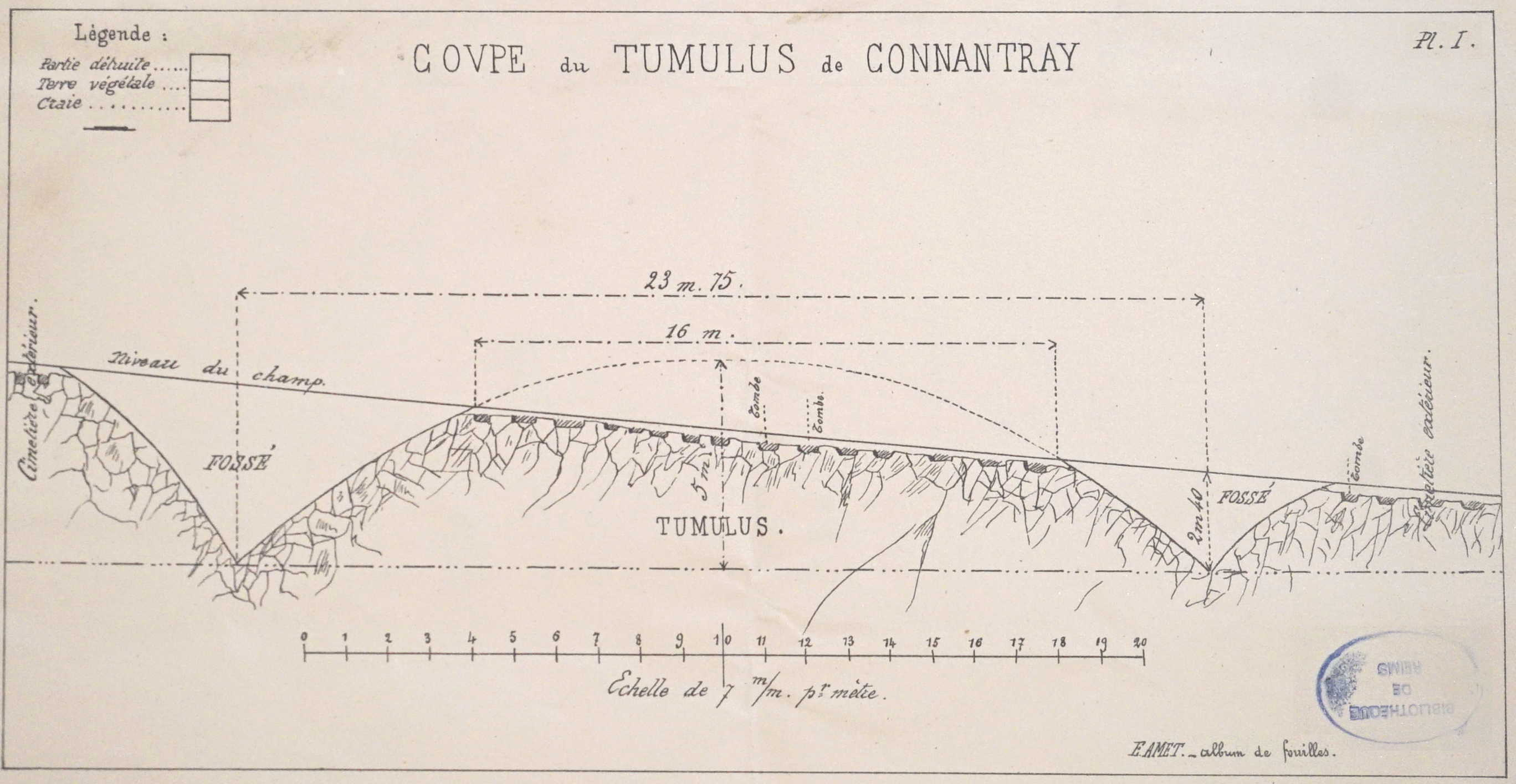 Imprimerie et lithographie de Sézanne, 3 mail Mont-Blanc, "album des fouilles entreprises en 1887 dans la cimetière gaulois à Connantray" réalisée par E.Amet. exemplaire conservé à la BMR sous la cote CXLI 182B.